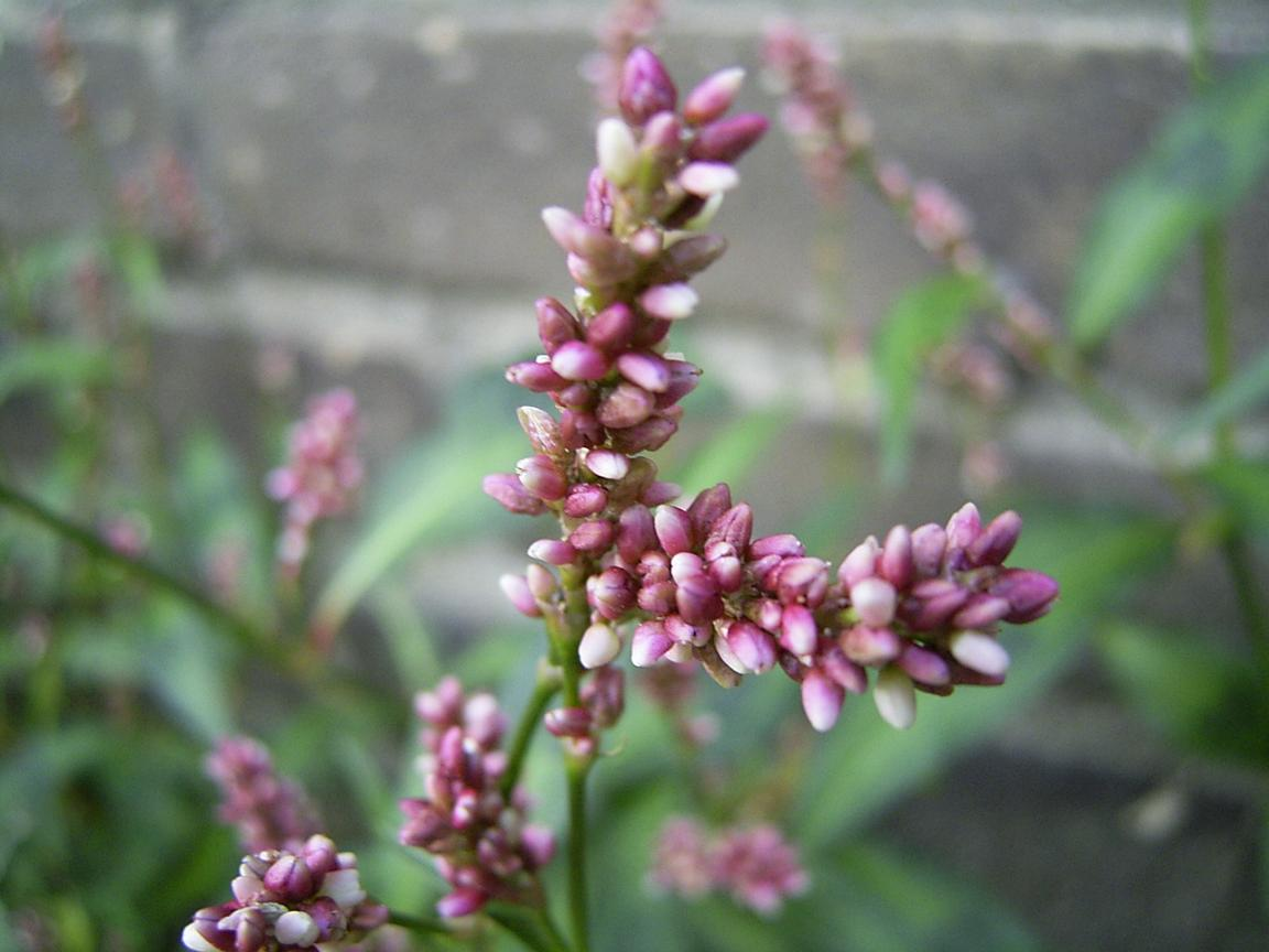 Persicaria maculosa (syn. Polygonum persicara), den Haag, augustus 2004